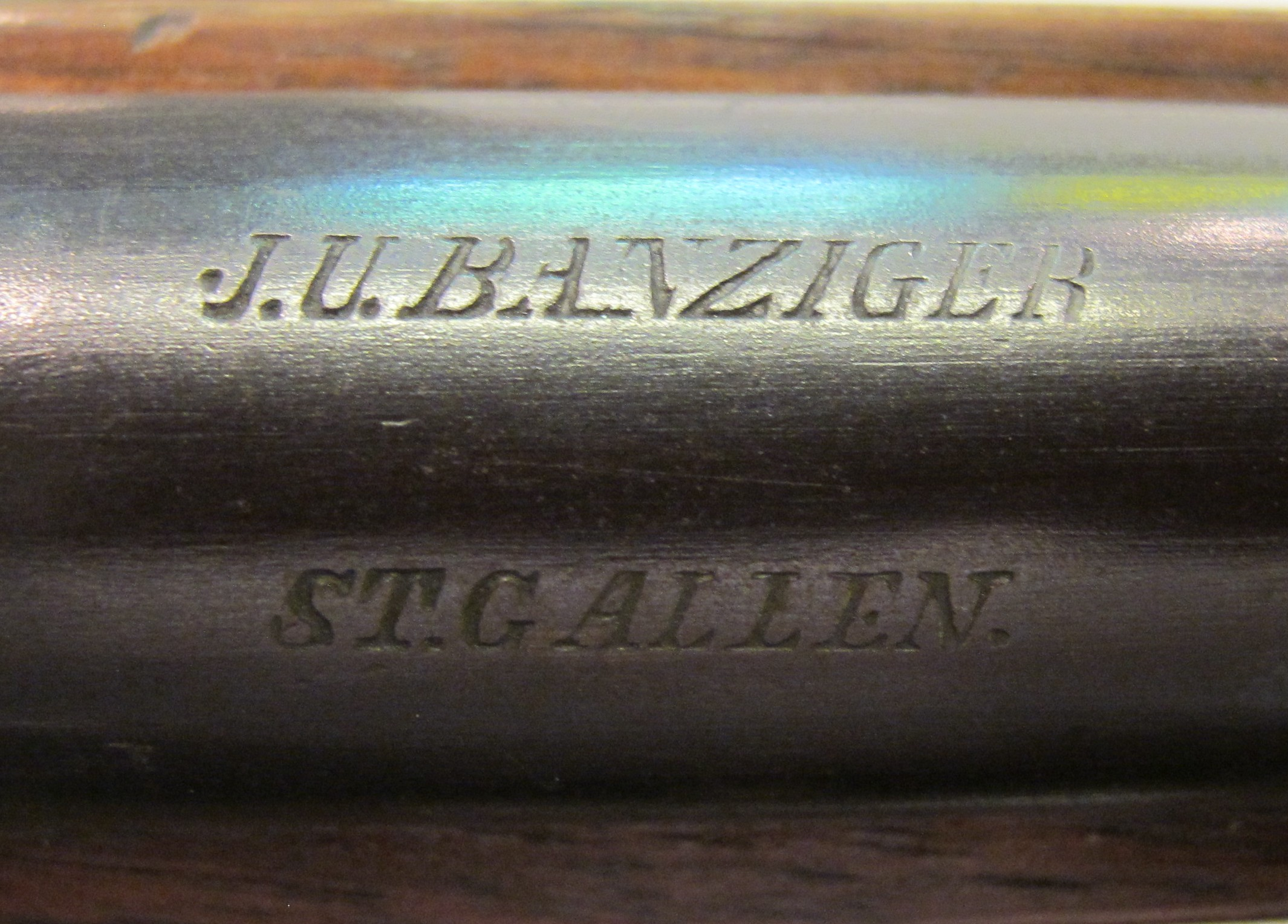 Johann Ulrich Banziger, armurier à St Gall entre 1848 et 1906. Il a présenté des armes de chasse et de tir à l'exposition nationale de 1883 à Zurich.